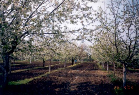 Cseresznyevirágzás Nagykörűn